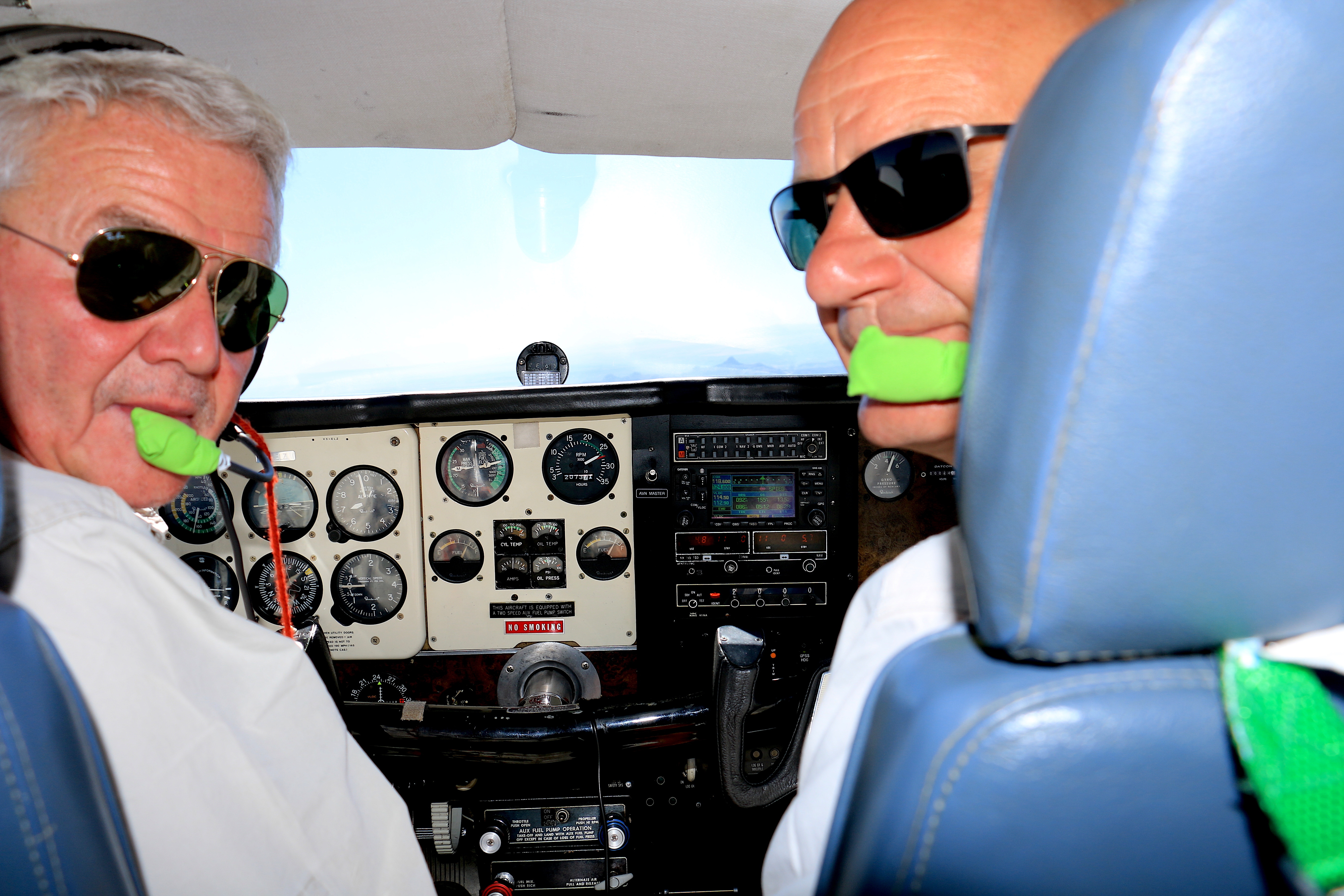 Private pilot and passenger in a Beechcraft A36 near Spiegelberg, Namibia (2016)